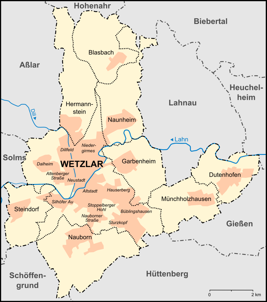 Karte der Stadtteile, Stadtbezirke und Umlandgemeinden Wetzlars